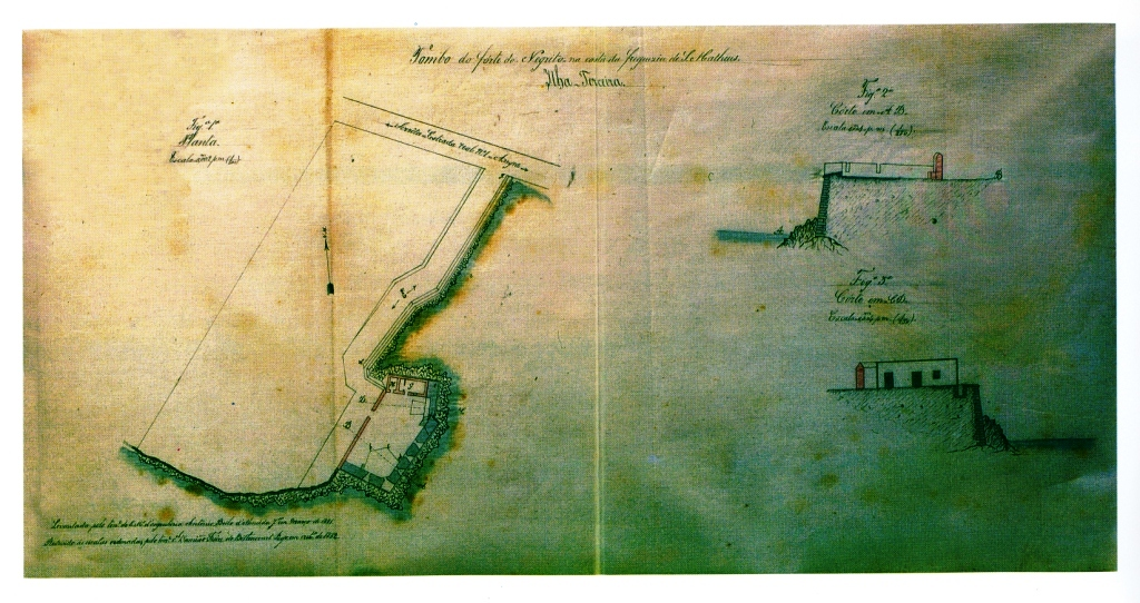 "Tombo do Forte do Negrito, na costa da freguezia de S. Matheus". Ilha Terceira (Açores), Portugal.